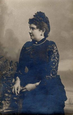 Vízvári Gyuláné Szigeti Jolán (1855-1907) kb. 40 éves korában.